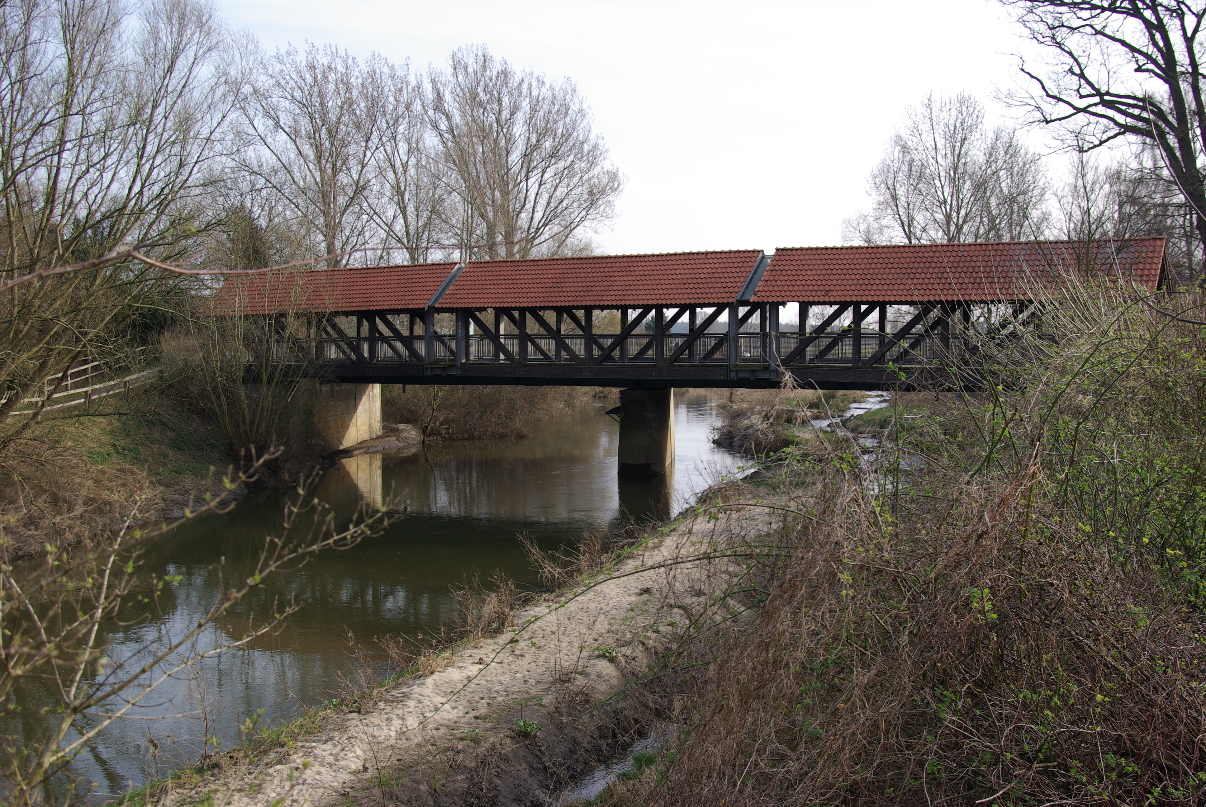 Meinseren in Niedersachsen. Die Brücke geht über die B188 in Meinsersen.